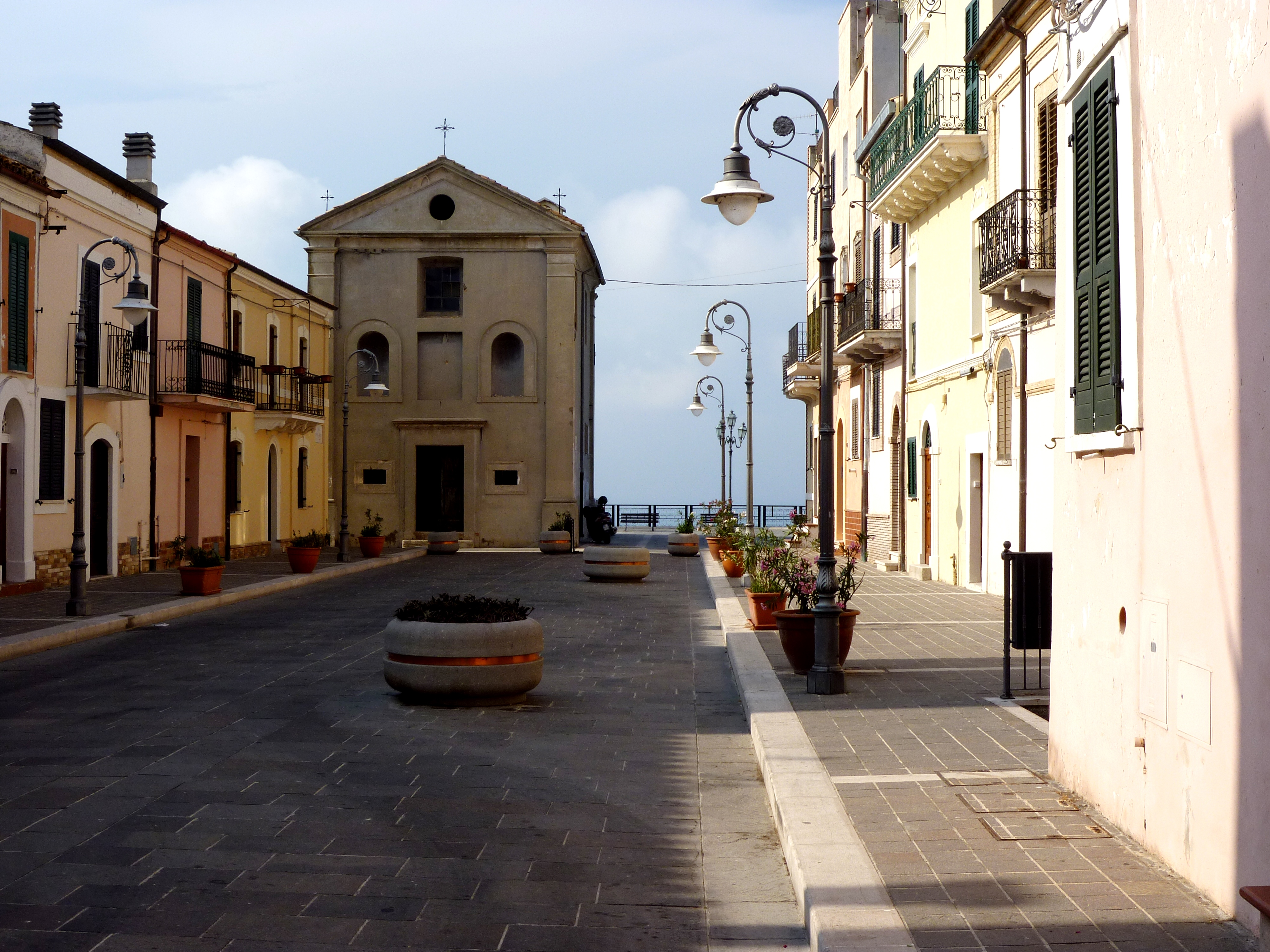 Scorcio di corso Trento e Trieste a San Vito Chietino, Chieti. Sullo sfondo la chiesa di San Francesco da Paola.